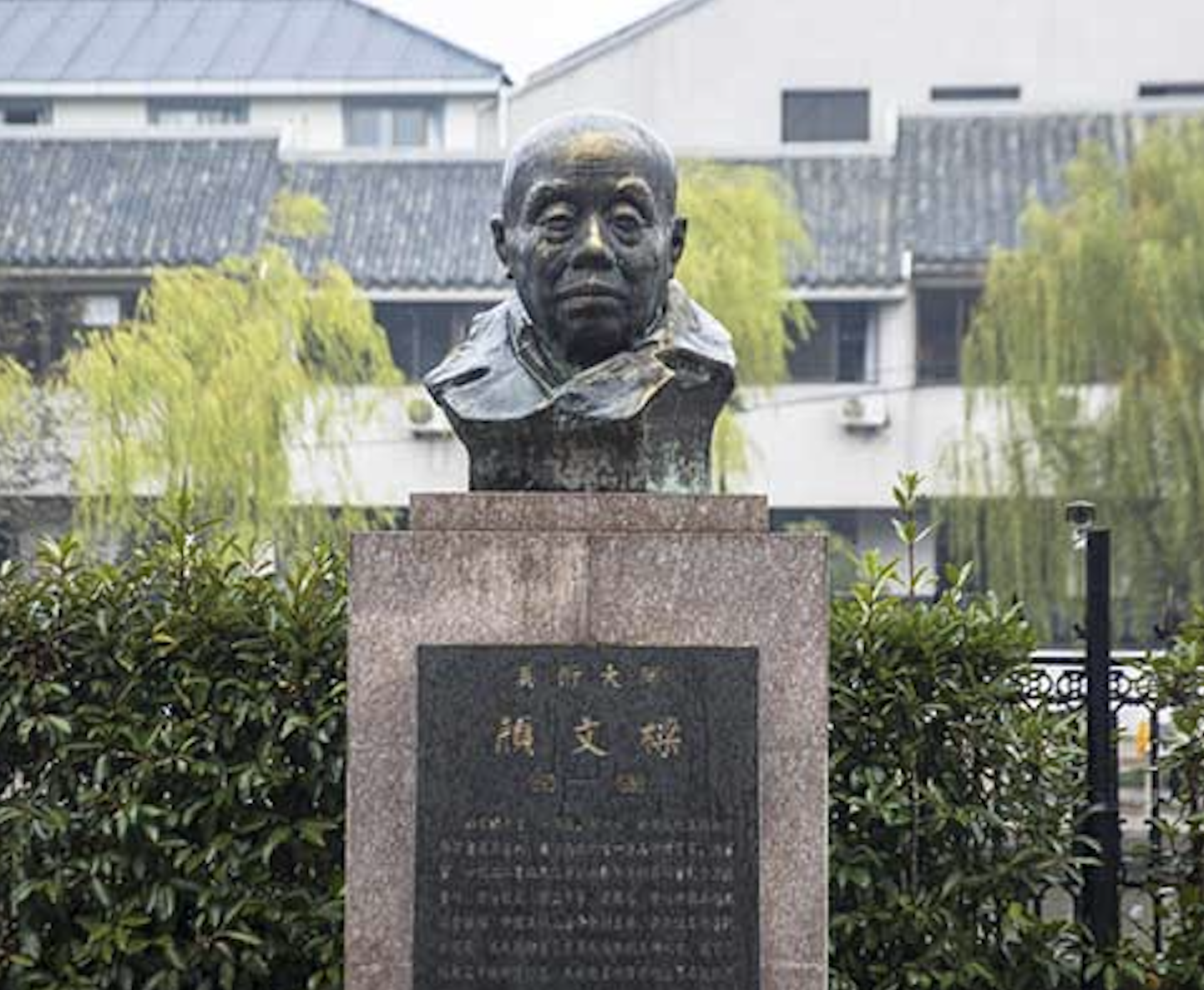 顏文樑銅像